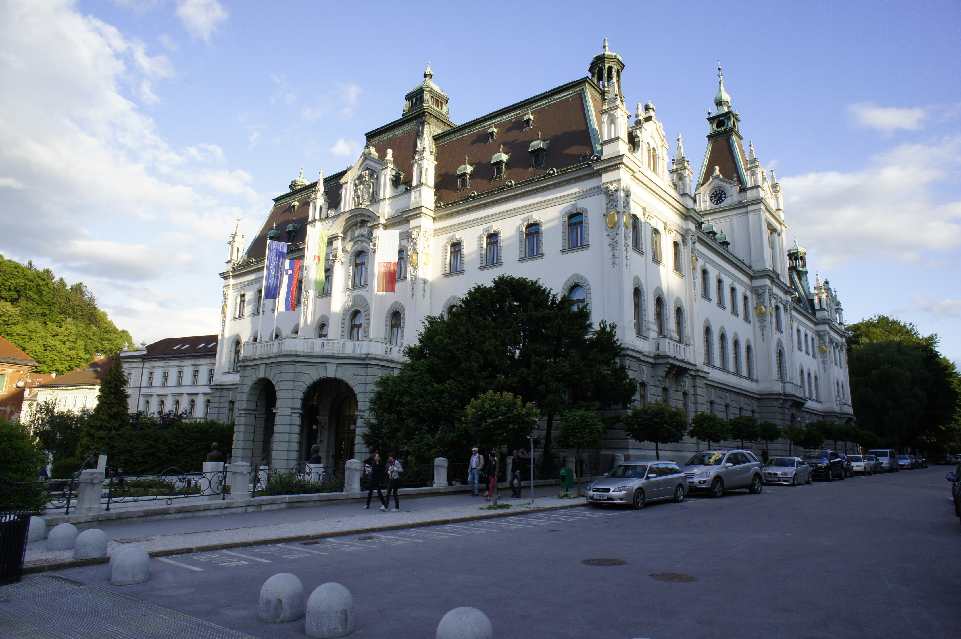 Ljubliana Slovenia